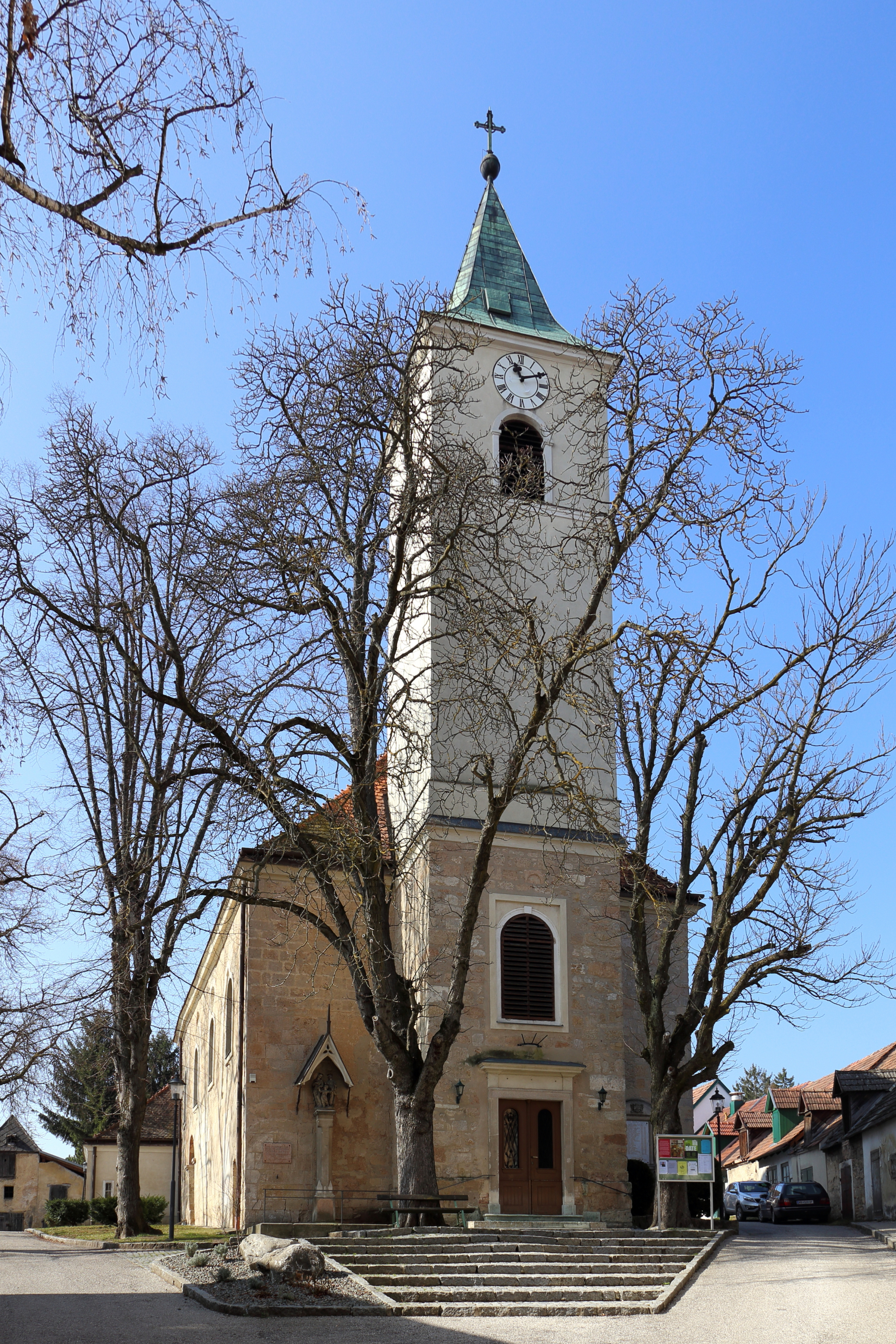 Ostansicht der Pfarrkirche hl. Martin in der niederösterreichischen Marktgemeinde Bad Fischau-Brunn.